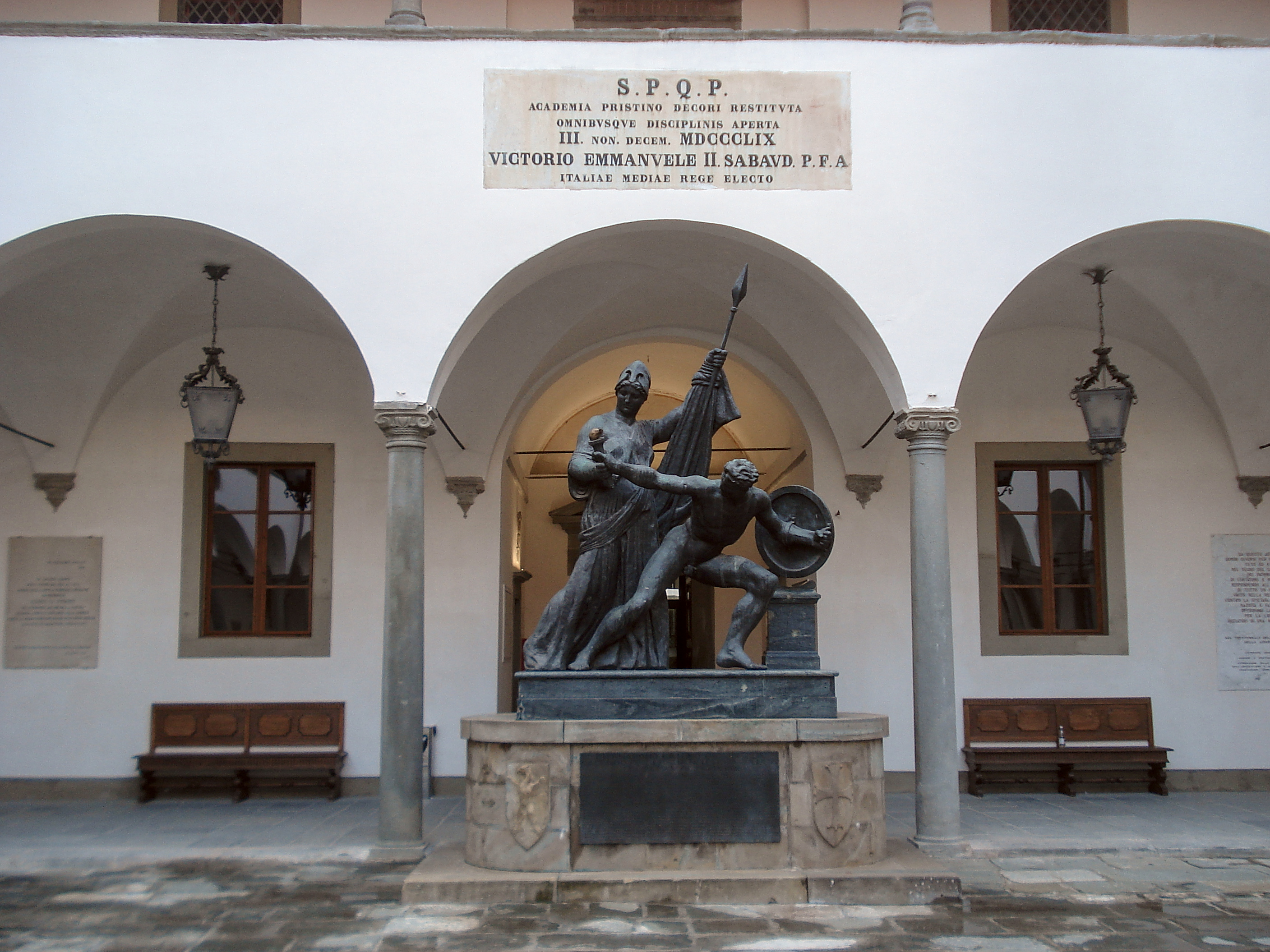 Monumento bronzeo agli studenti dell'Ateneo pisano caduti nella Prima guerra mondiale, scolpito da (Luigi) Gigi Supino. Cortile del Palazzo della Sapienza, a Pisa. This is a photo of a monument which is part of cultural heritage of Italy.